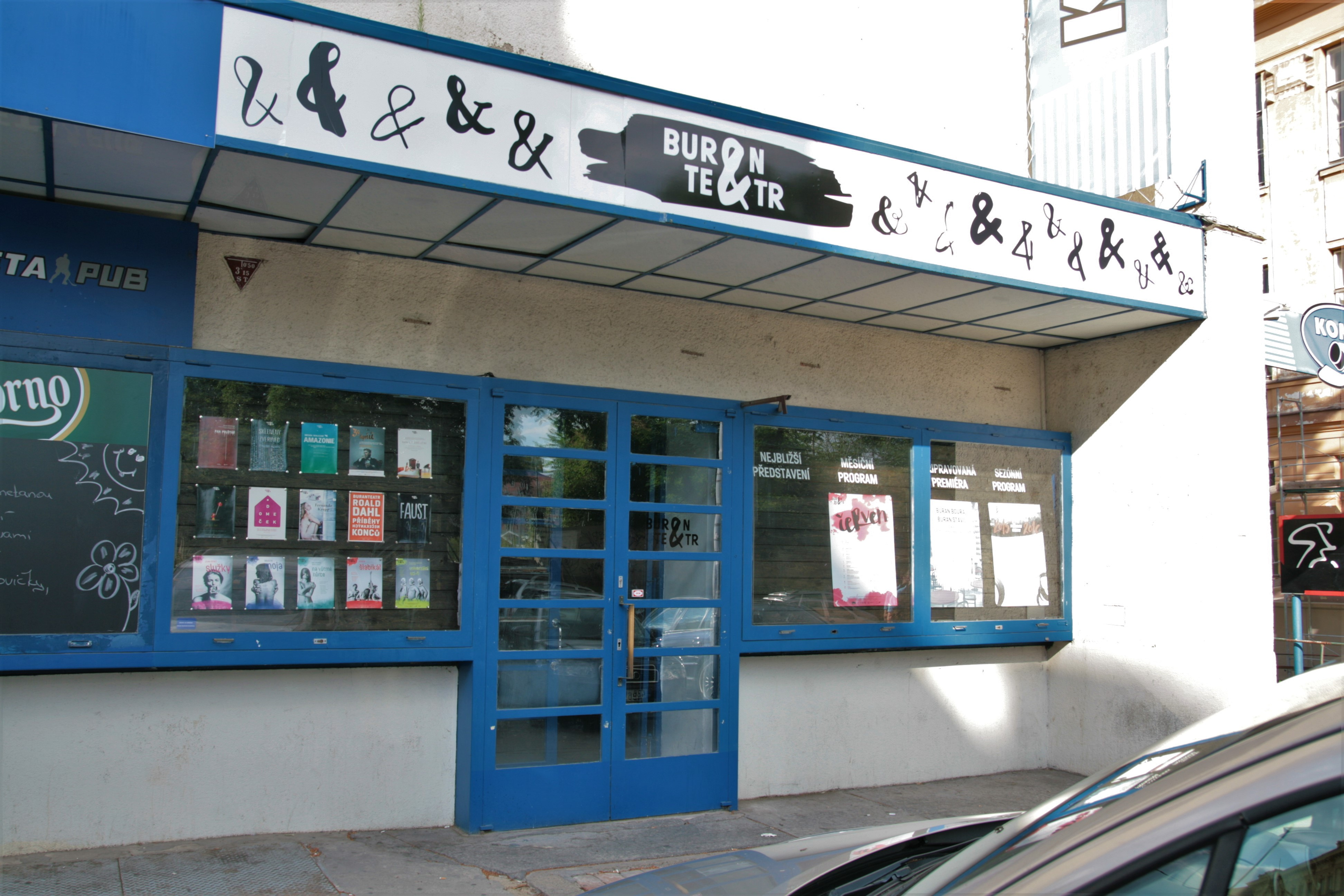 Budova Sokolského Stadionu na Kounicově ulici v Brně. Vstup do Buranteatru.